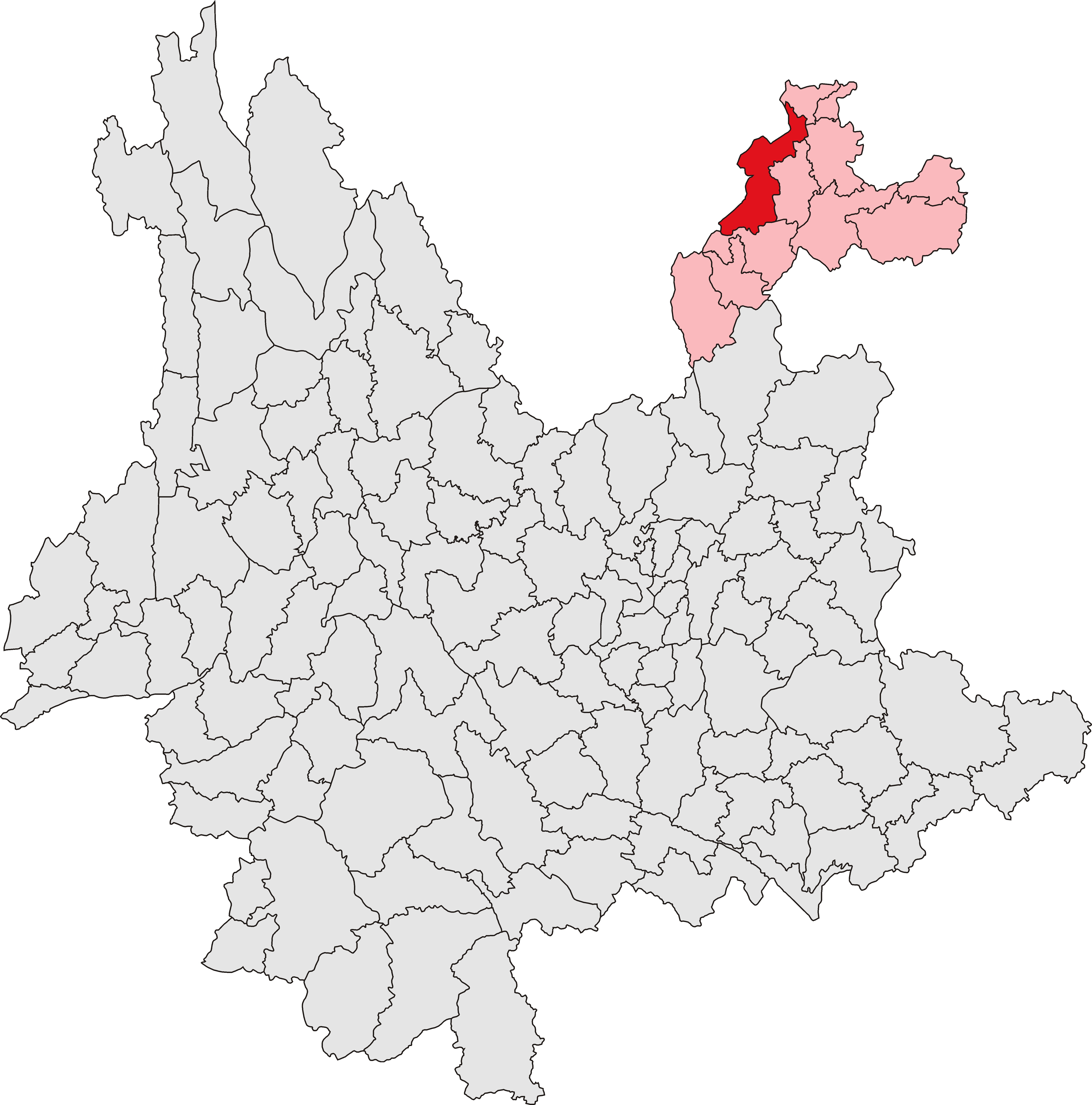 中文（中国大陆）: 永善县位置图